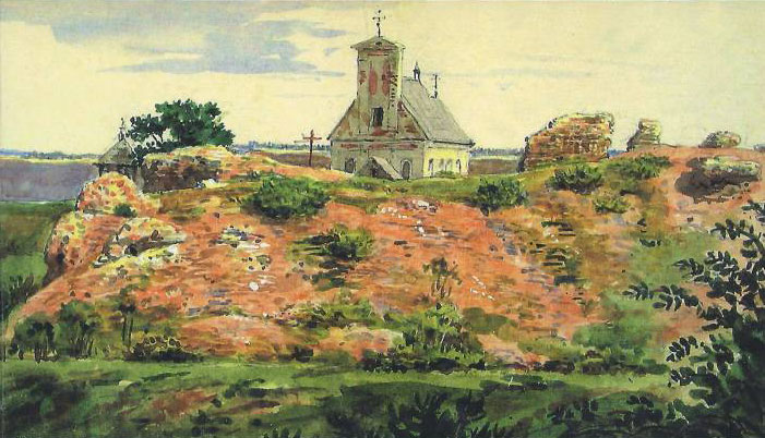 Беларуская (тарашкевіца): Геранёны